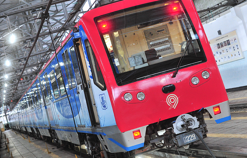 Именной электропоезд метро «С новым годом, Москва!» типа 81-740/741 «Русич» в депо Красная Пресня. Головной вагон 0229